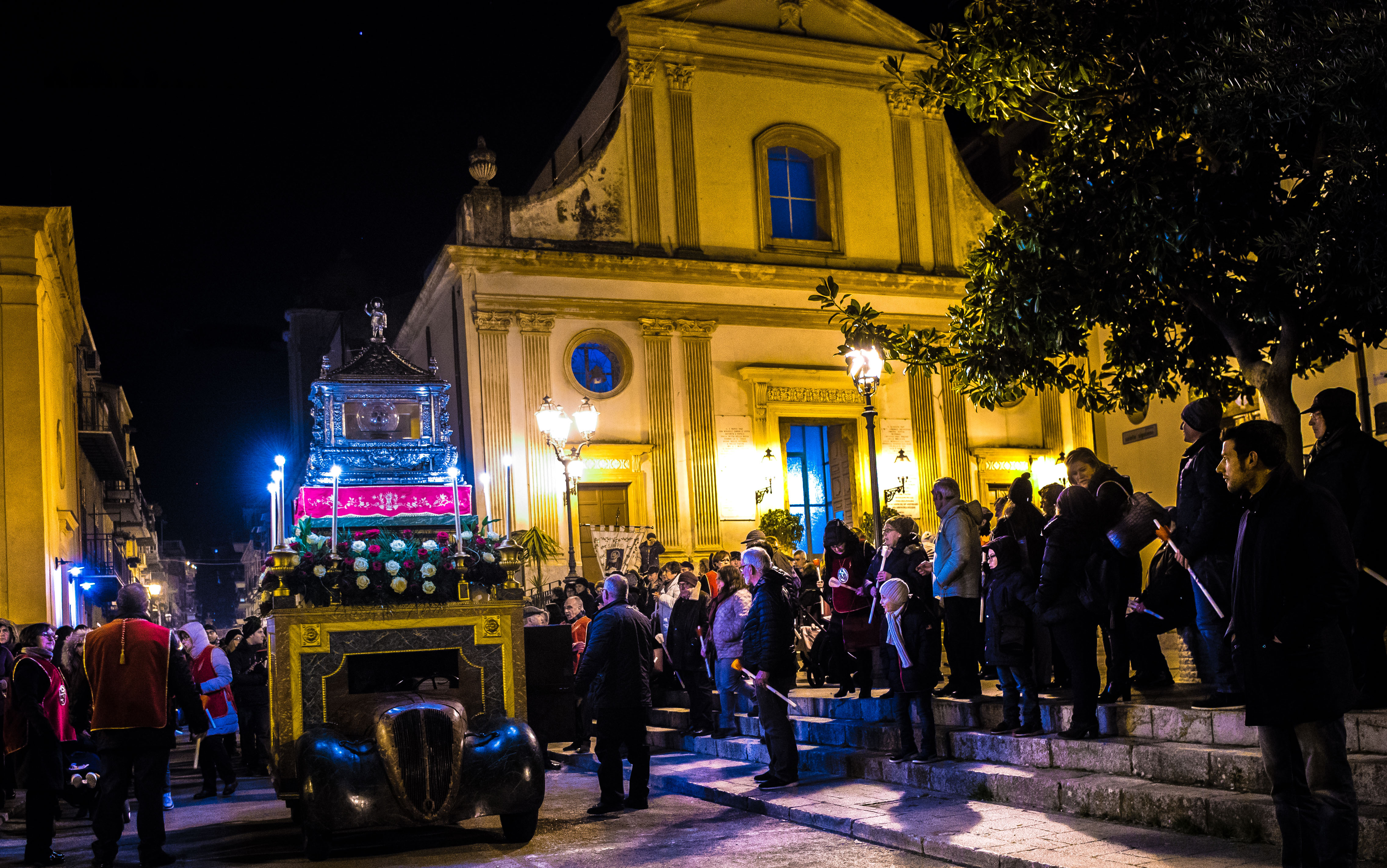 Urna di San Ciro Marineo - in processione - 31 gennaio 2017 - detto anche San Ciro "Puvureddu" in contrapposizione alla grande festa che si realizza la penultima Domenica del mese di Agosto